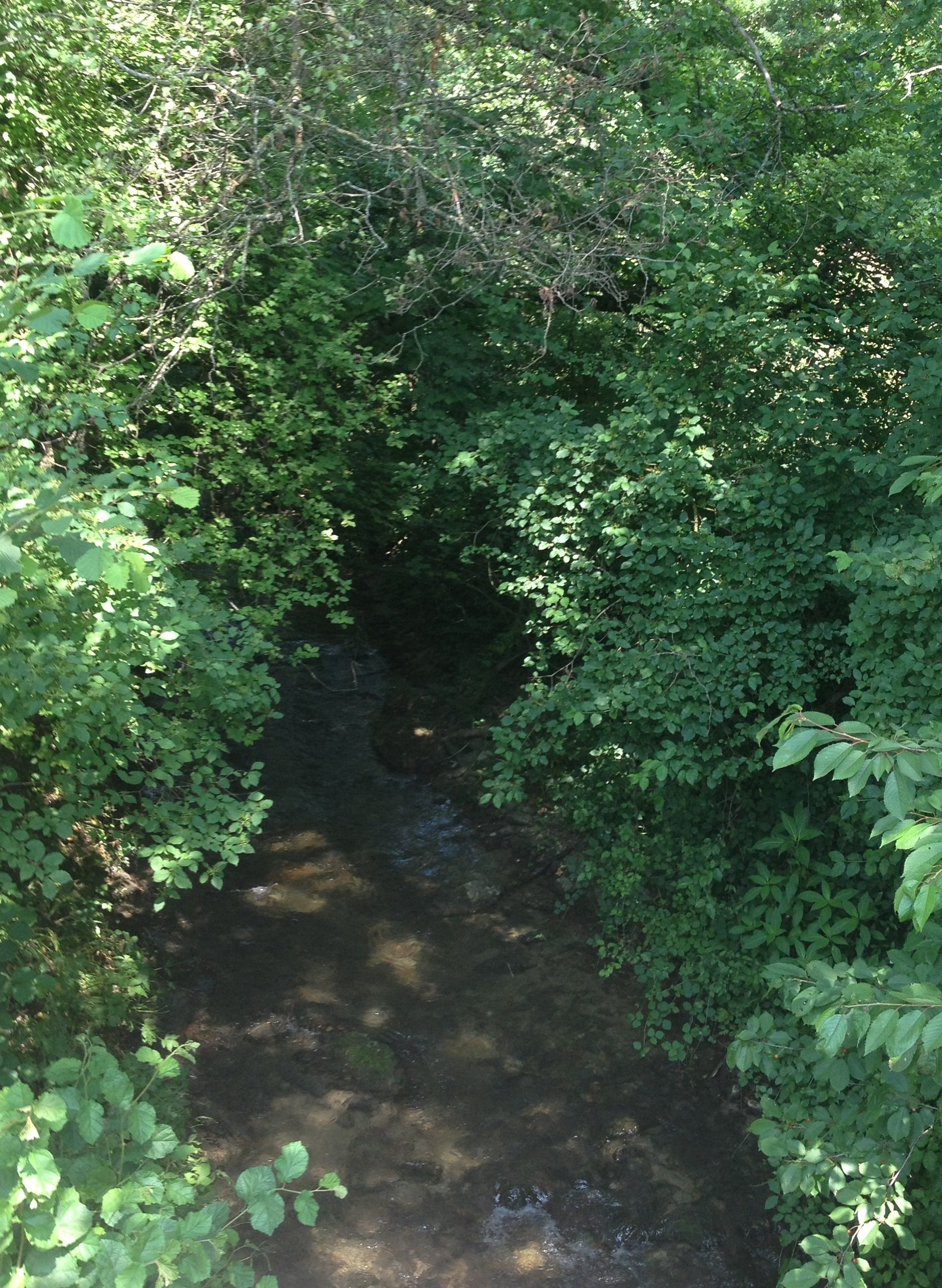 La Lembaz, ou Lembe, entre Coumin-dessous et Cheiry en Suisse.